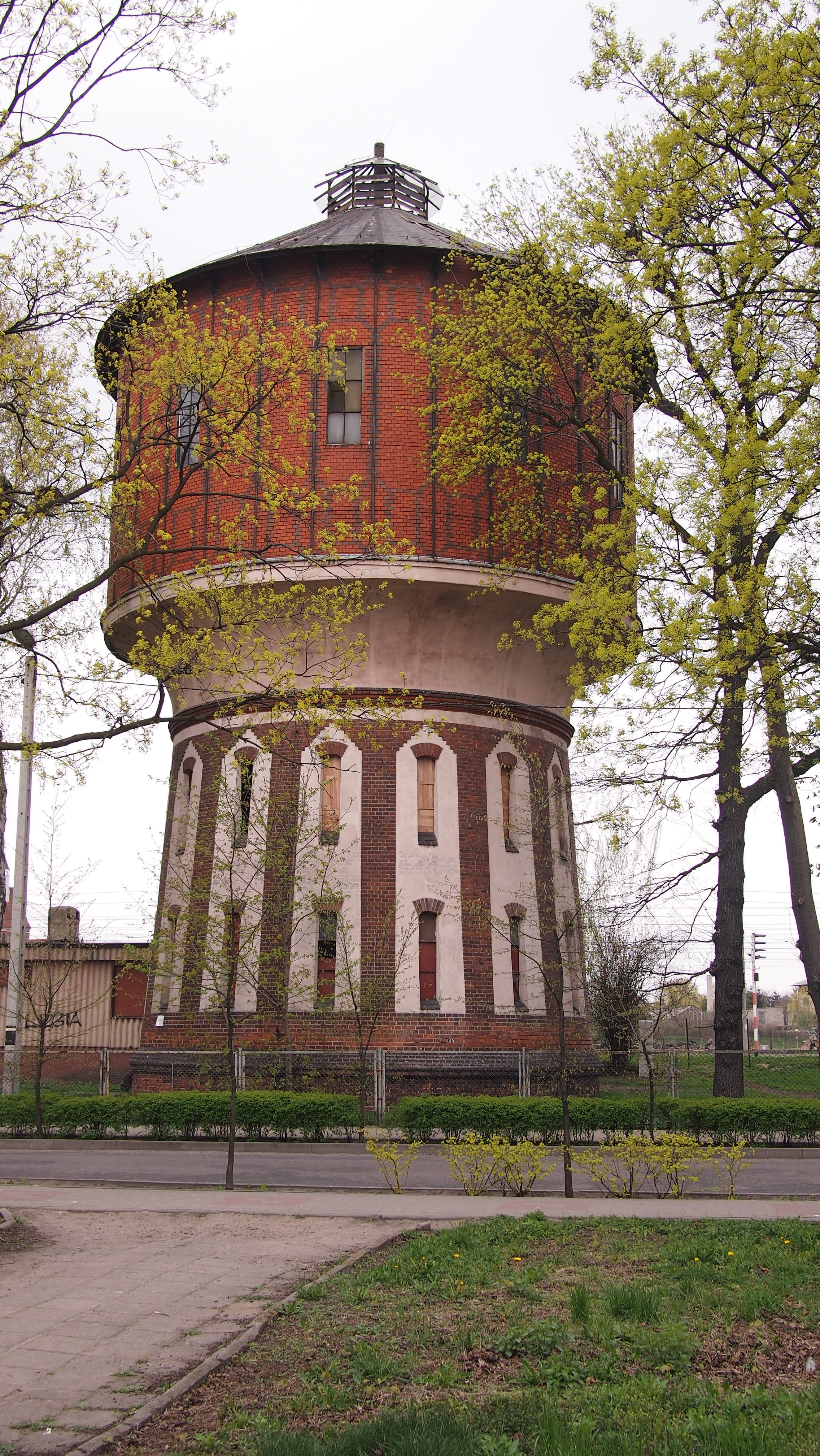 water tower , wasserturm